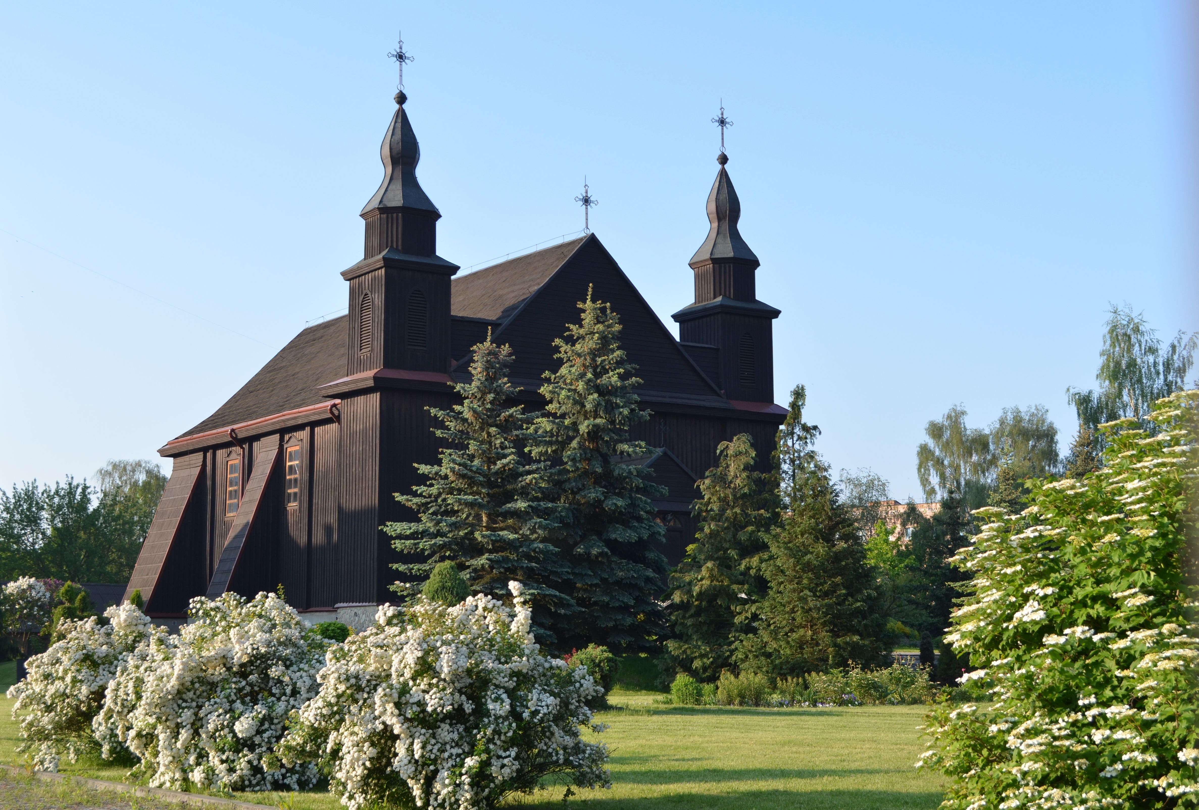 Костел святої Анни (дер.) з с. Вишеньки Рожищенського району, Ковель, вул. Вербицького, 1а